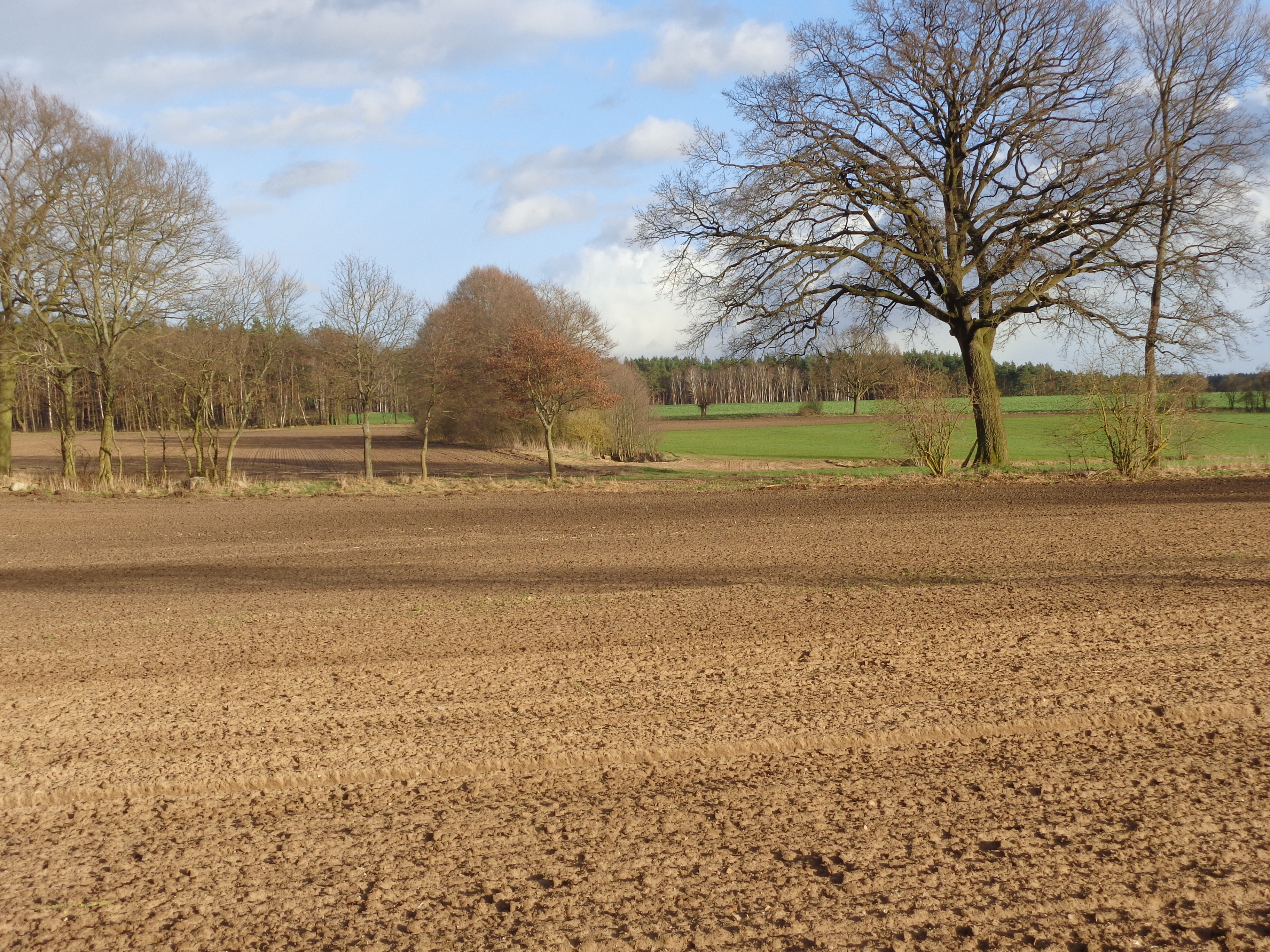 Landschaft in der nördlichen Prignitz bei Gramzow